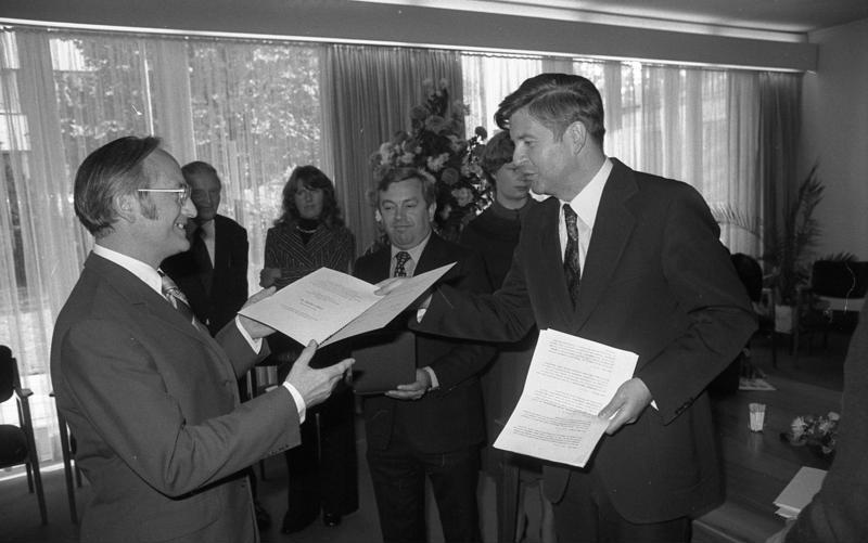 Präsident des Deutschen Nationalkomitees für Denkmalschutz, bayerischer Staatsminister Professor Dr. Hans Maier nimmt Ehrung von Journalisten vor, die sich durch Pressebeiträge für das Europäische Denkmalschutzjahr 1975 besonders eingesetzt haben in der Landesvertretung Bayern 25.10.1976